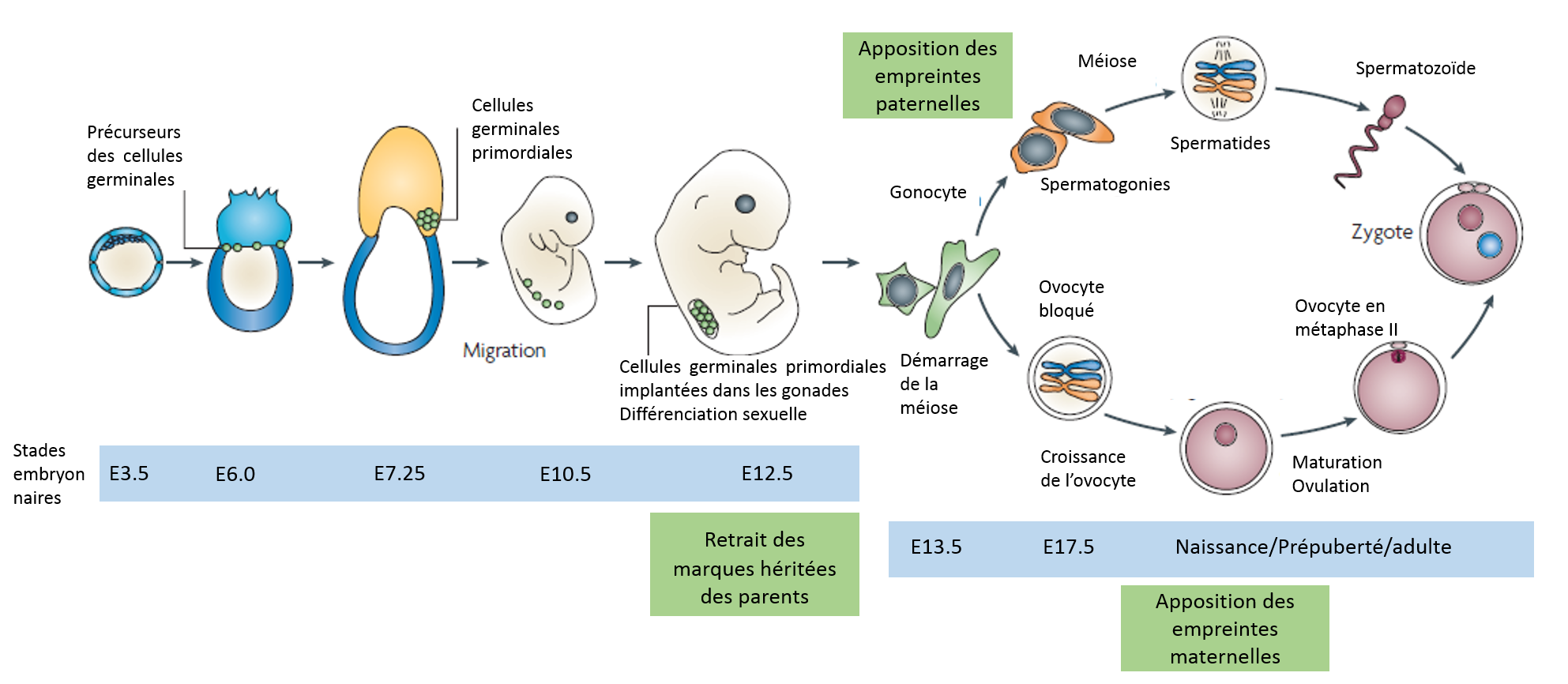 Schéma montrant les différentes étapes de mise en place de l'empreinte parentale dans les cellules germinales au cours du développement.